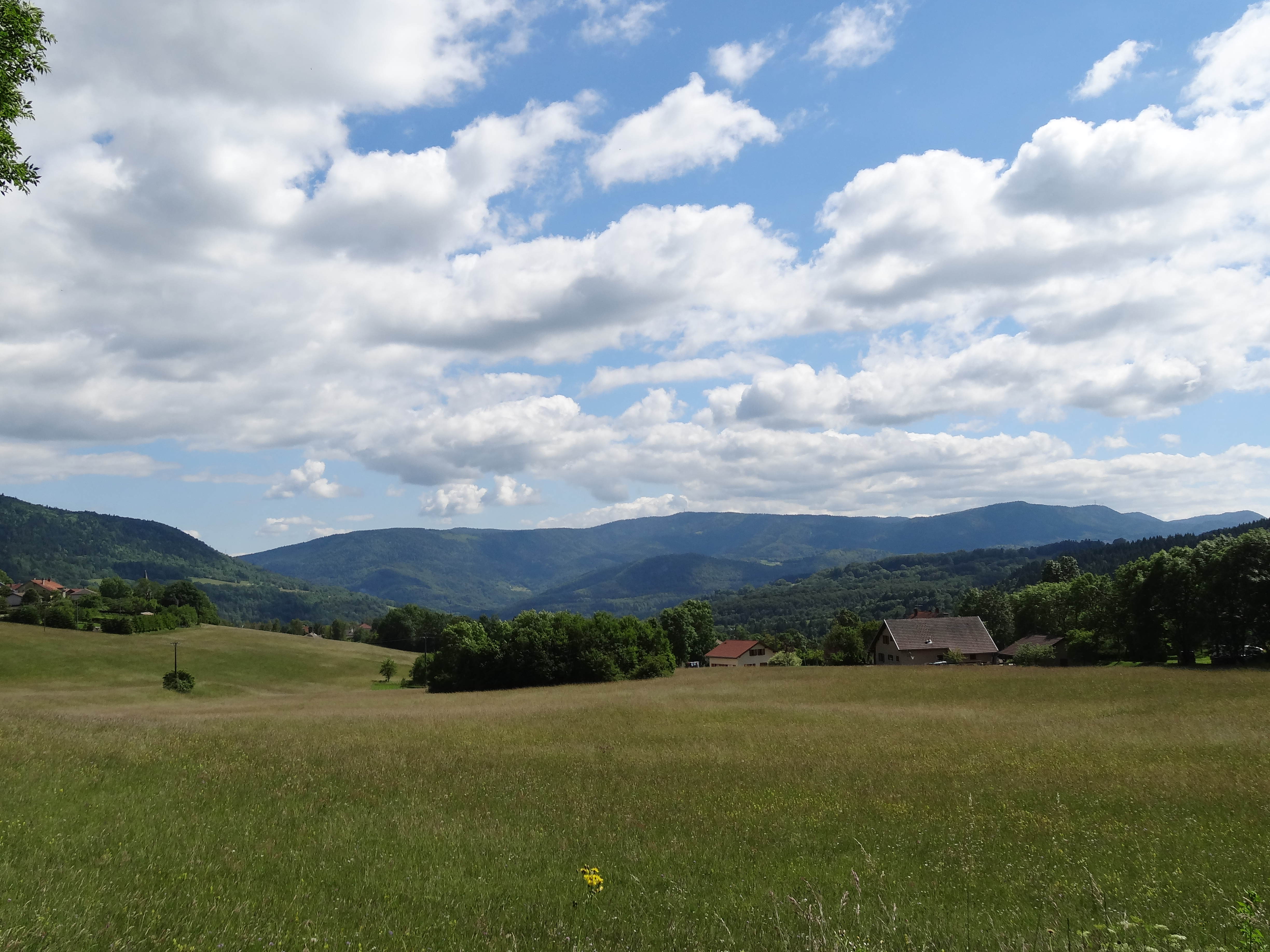 Paysage d'Échallon et sur la vallée alentours.